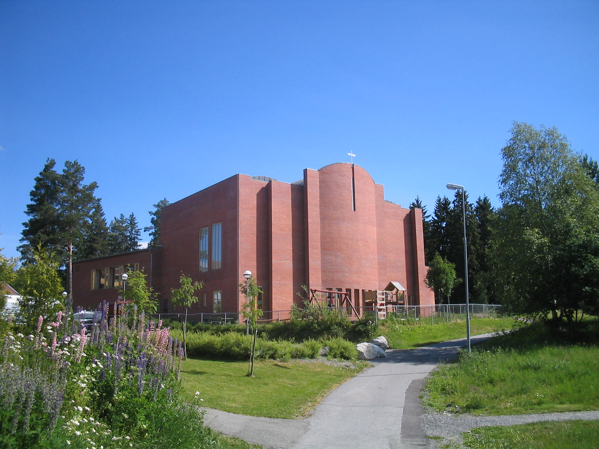 Konnerud kirke, Drammen